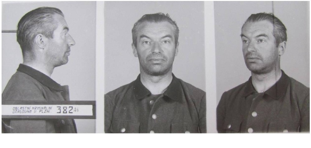 Wilhelm Pleyer 1946 zatčení Plzeň